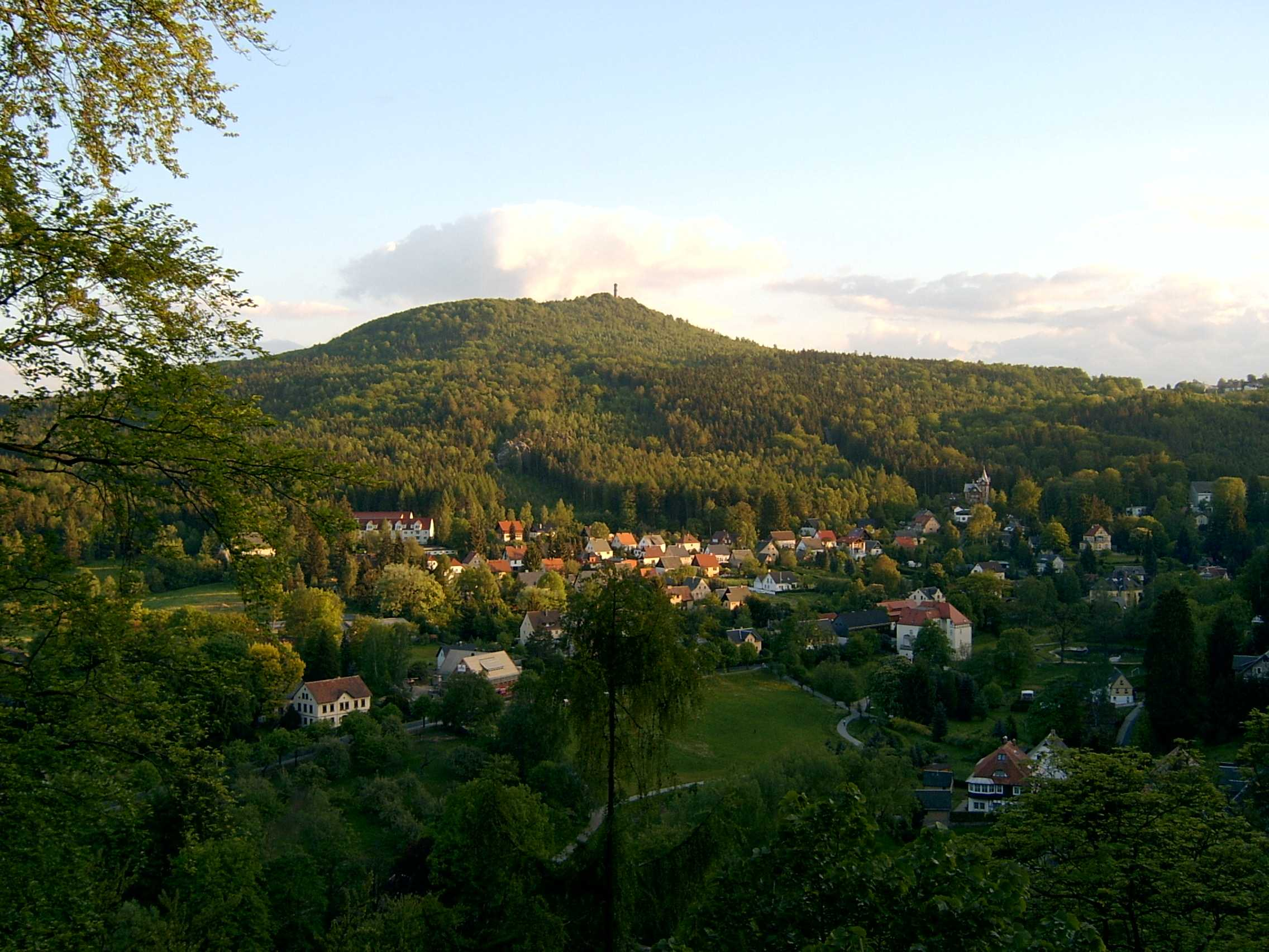 Hvozd